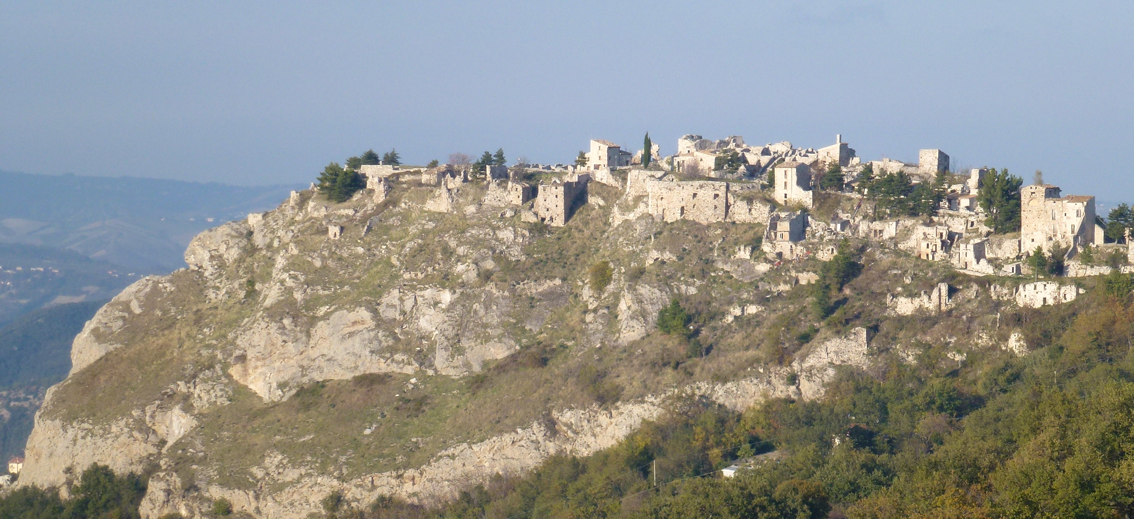 Lettopalena- La parte antica